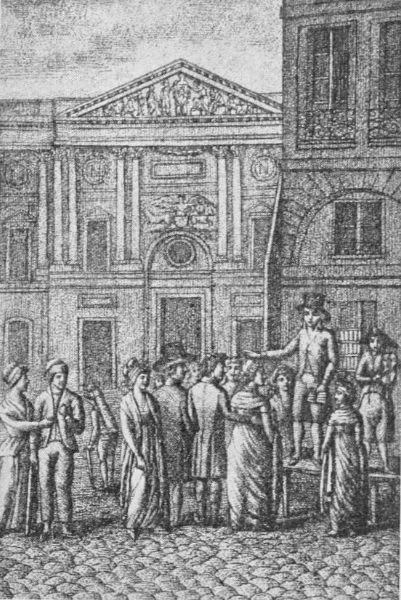 "Ange Pitou débitant ses chansons place Saint-Germain-l'Auxerrois. Le Chanteur parisien, dessin et gravure de Pitou."